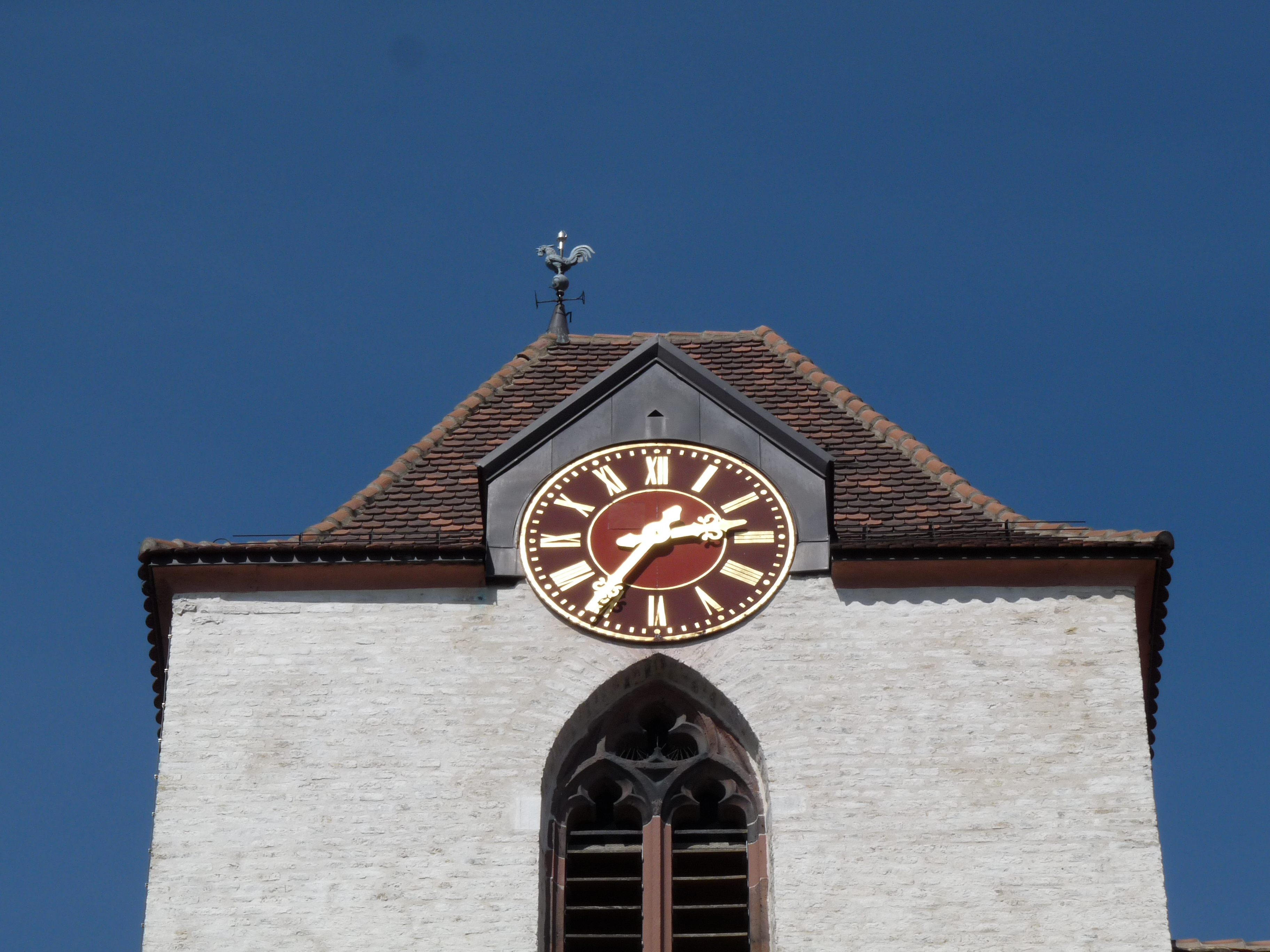 Eglise Sainte-Aurélie de Strasbourg. Horloge de Jean-Baptiste Schwilgué.